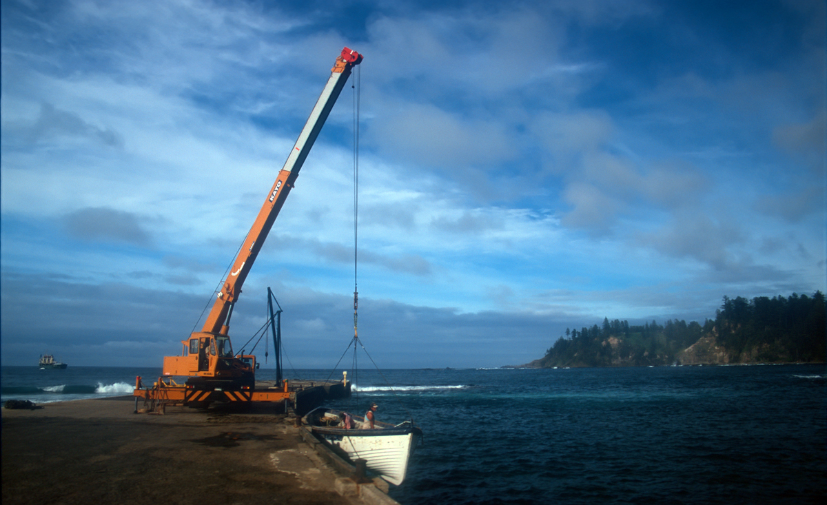 Jetty at Kingston, Norfolk Island.